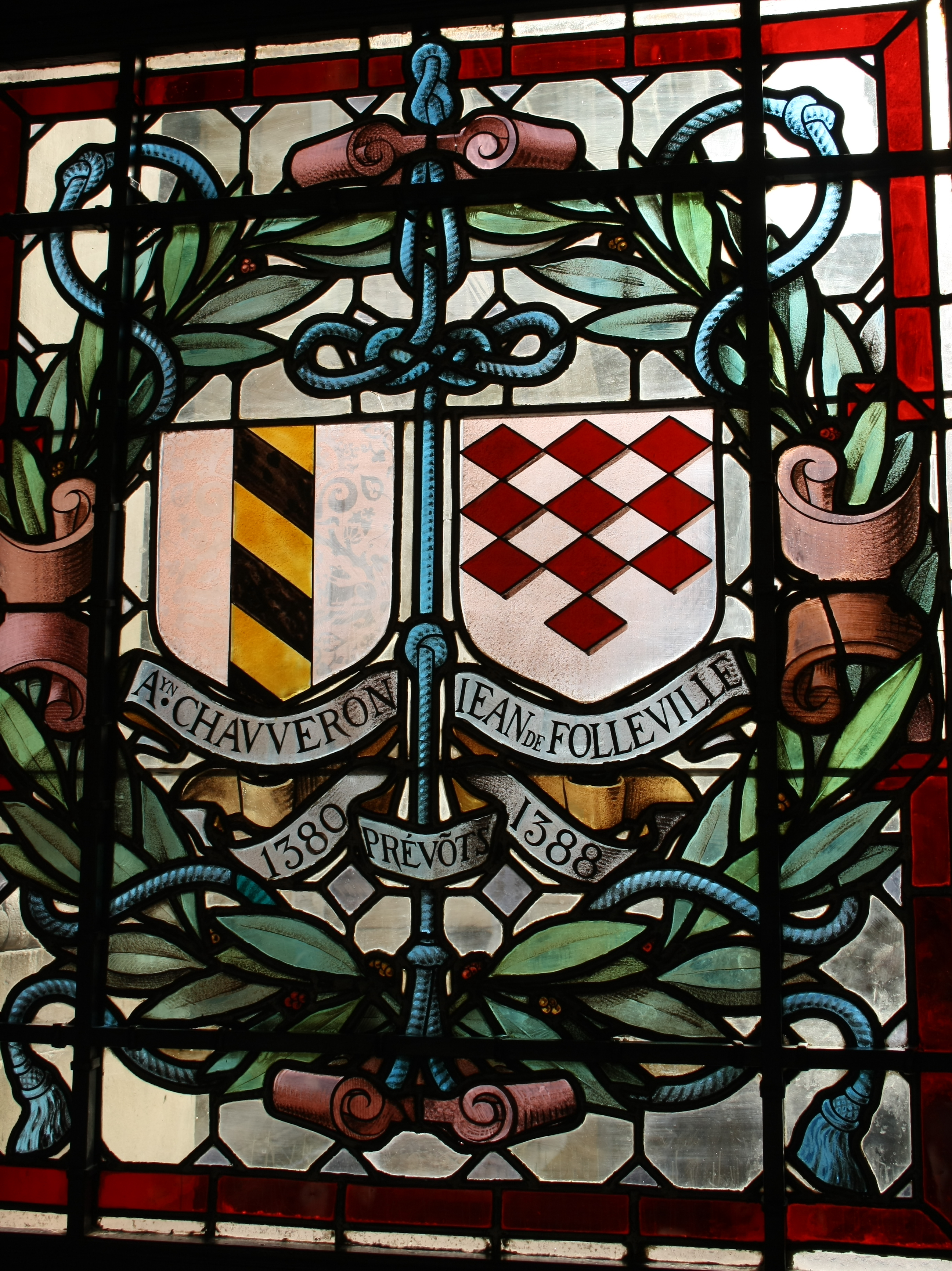 Bleiglasfenster im Rathaus von Paris (4. Arrondissement), "galerie du conseil", Darstellung: Wappen der Prévôt des marchands de Paris; A. Chauverau (1380) und Jean de Folleville (1388)